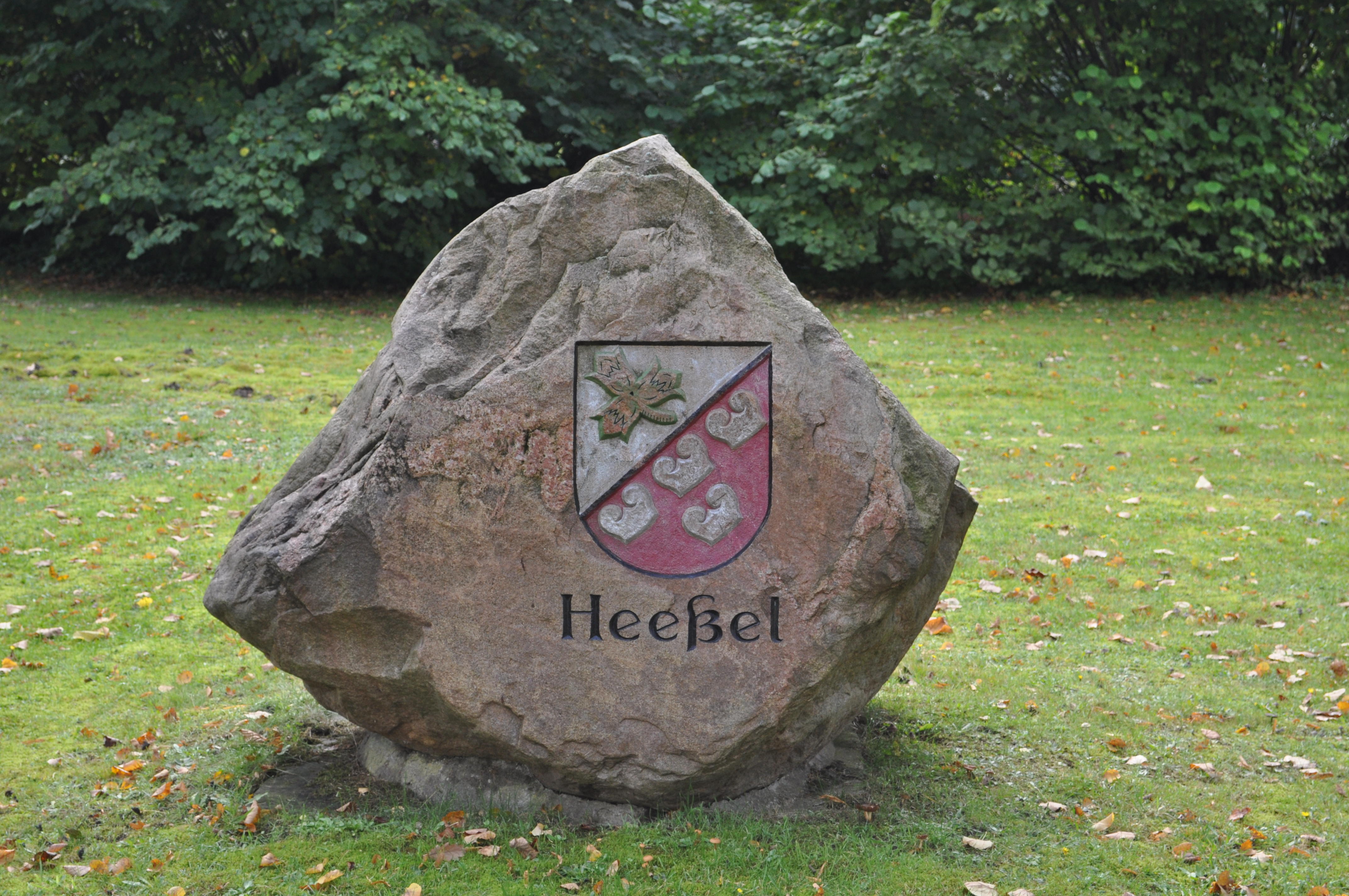 Wappenstein auf dem Heeßeler Dorfplatz.